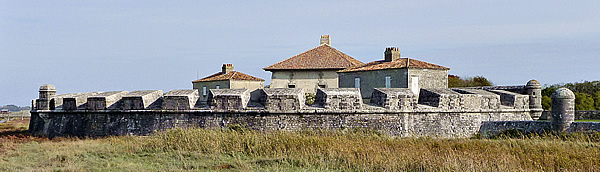 Fort Lupin - Les embrasures côté Charente - Charente-Maritime Photo issue de ma banque d'images : Pep.per 15 octobre 2006 à 00:46 (CEST)